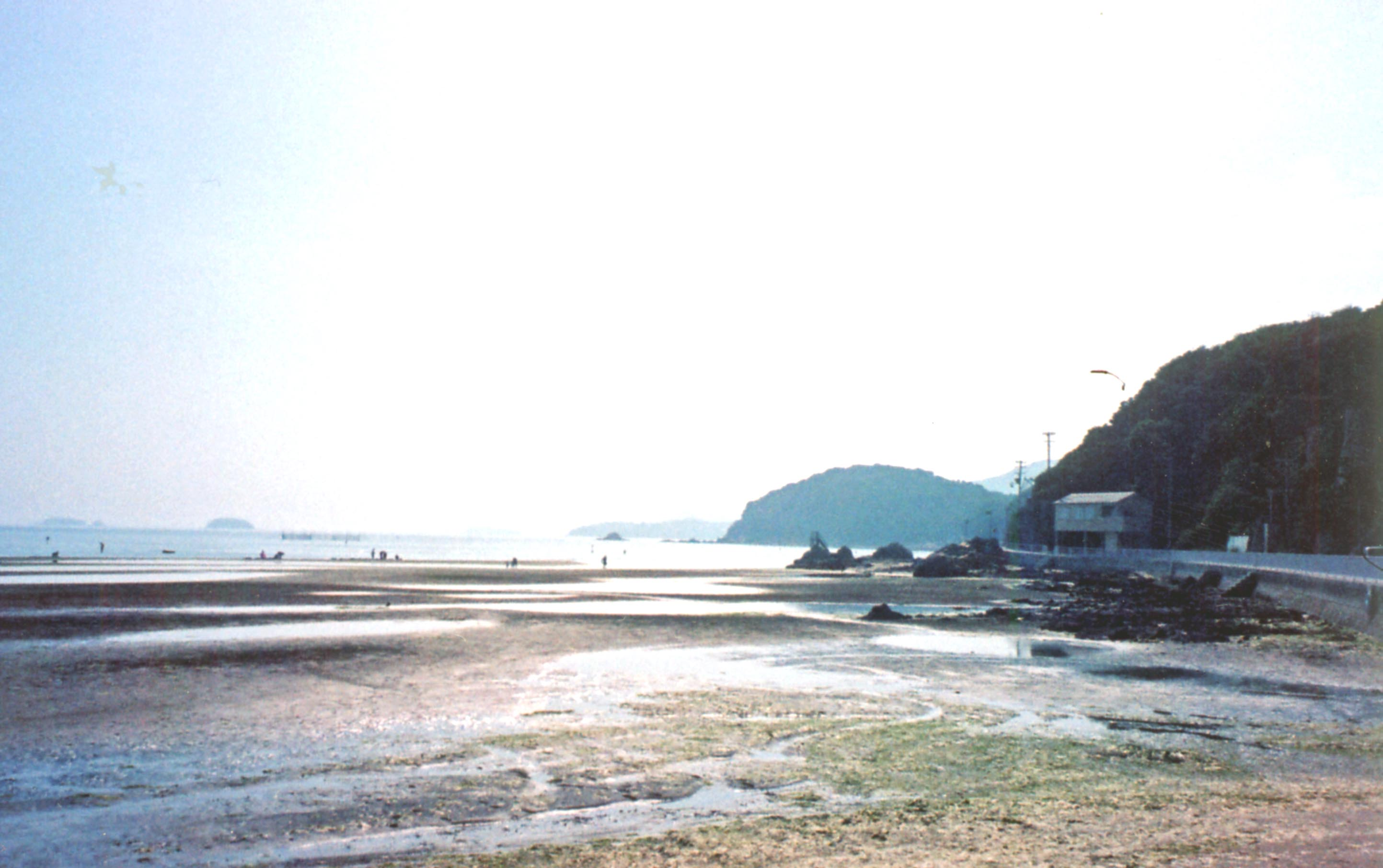 兵庫県たつの市新舞子海水浴場